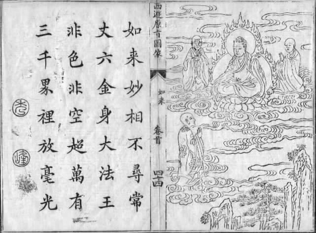 图像一 如来